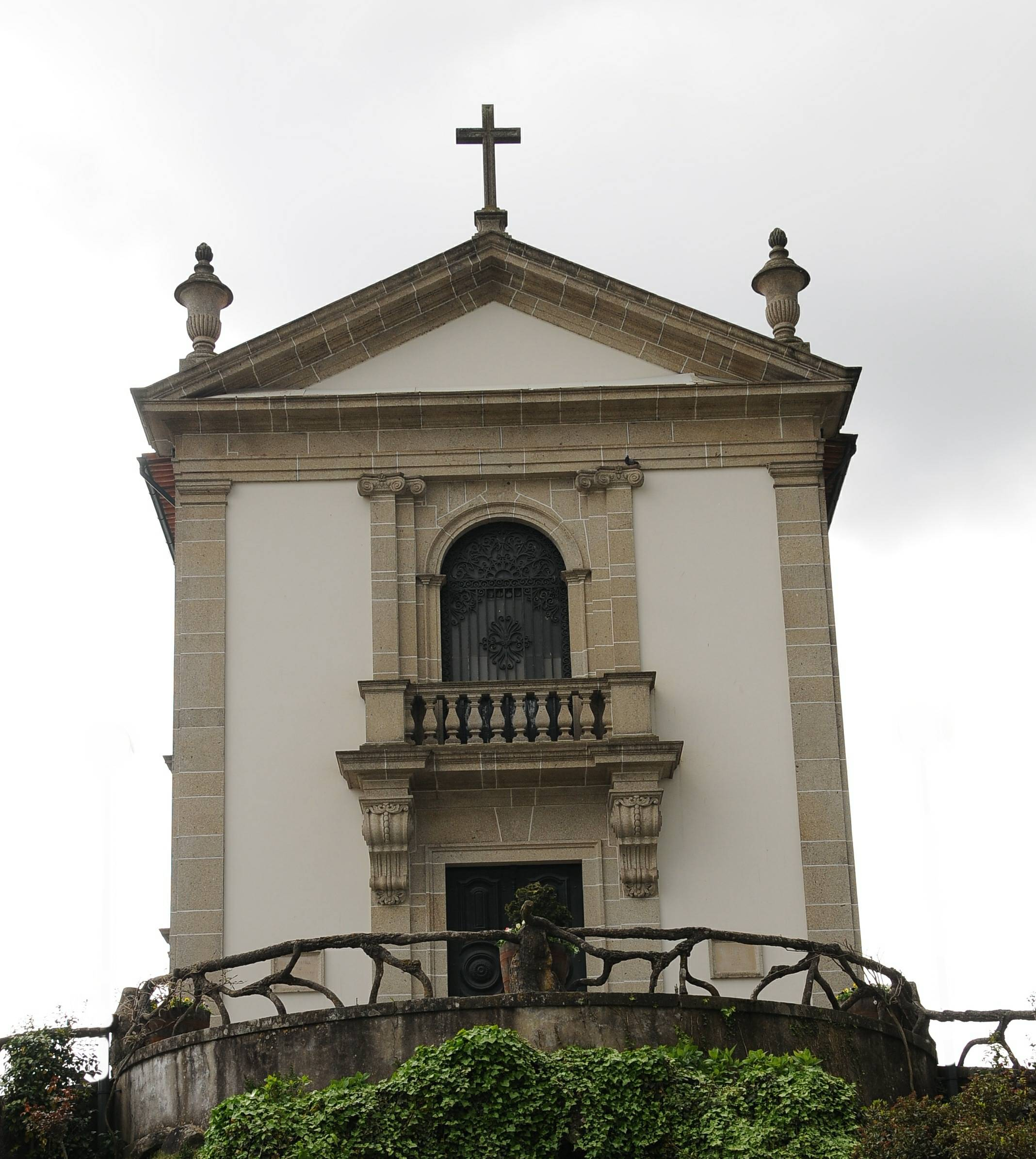 Sao Paio de Merelim Church, in Braga, Portugal